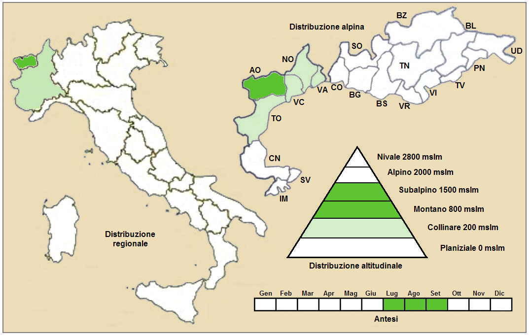 Aconitum degenii ssp. valesiacum (Gáyer) W.Mucher (1993) - Distribuzione